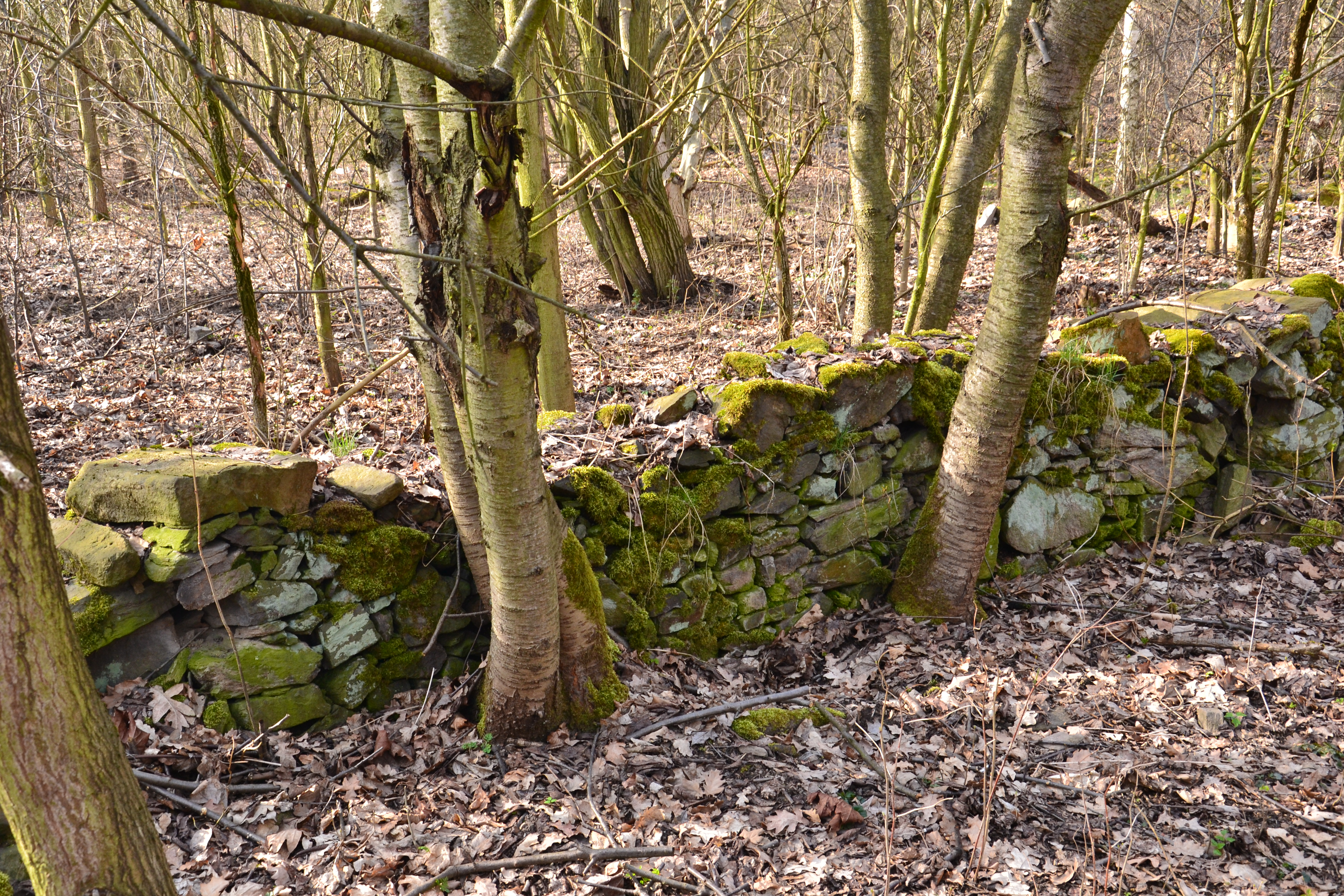 Fragment ohradní zdi